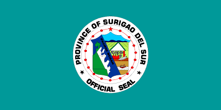 Dit materiaal is afkomstig van of en is door de auteur Jaume Ollé als GFDL beschikbaar gesteld, zie de toestemmingsemail. Hiermee vervallen de strictere voorwaarden in de disclaimers op de genoemde sites.Vrijgegeven bijdrage op Flags of the World van Jaume Olle. Zie deze verklaring op de Spaanstalige Wikipedia. GNU FDL